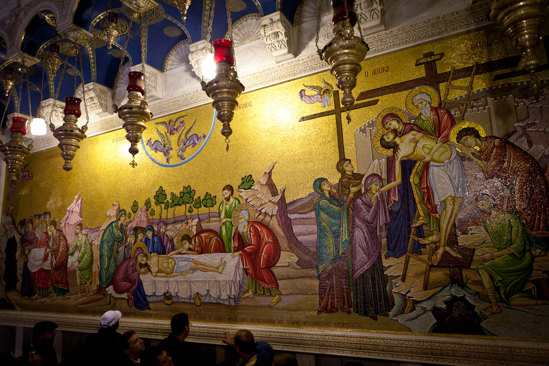 Jerusalem